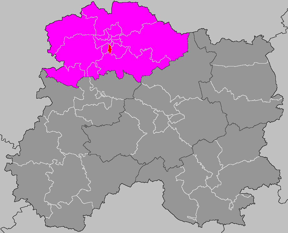 Localisation du canton de Reims-9